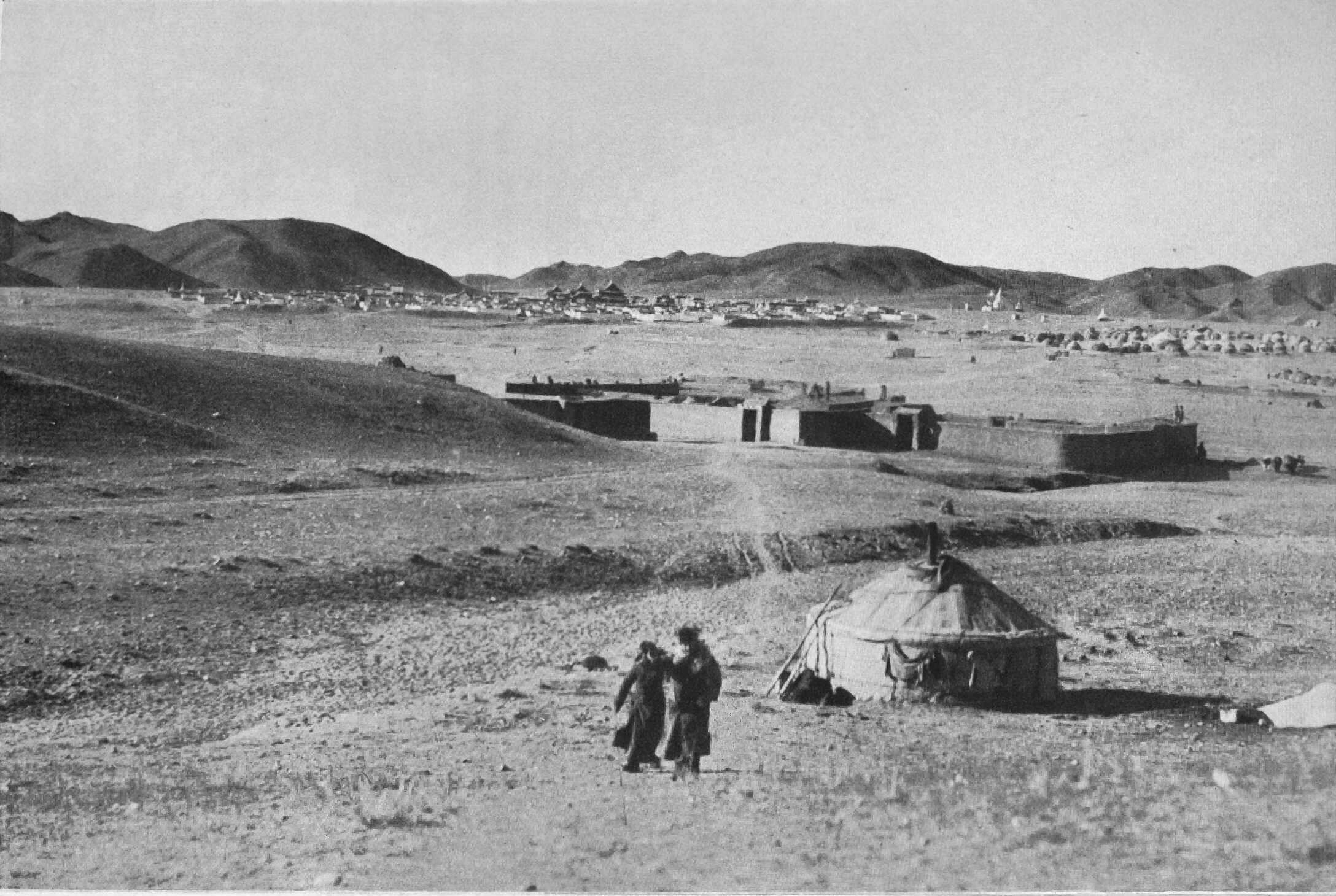 Blick auf das Sommerlager der „Hauptstadt“ Bǎilíngmiào (百靈廟, W.-G. Pai-ling-miao, mongolisch Bat Chaalga oder Bathahalak) - Verwaltungssitz seines „autonomen mongolischen Rates“ (蒙古地方自治政務委員會) des „Fürsten“ Demchugdongrub (alias Teh Wang), 1934. Der namensgebende Tempel im Hintergrund.